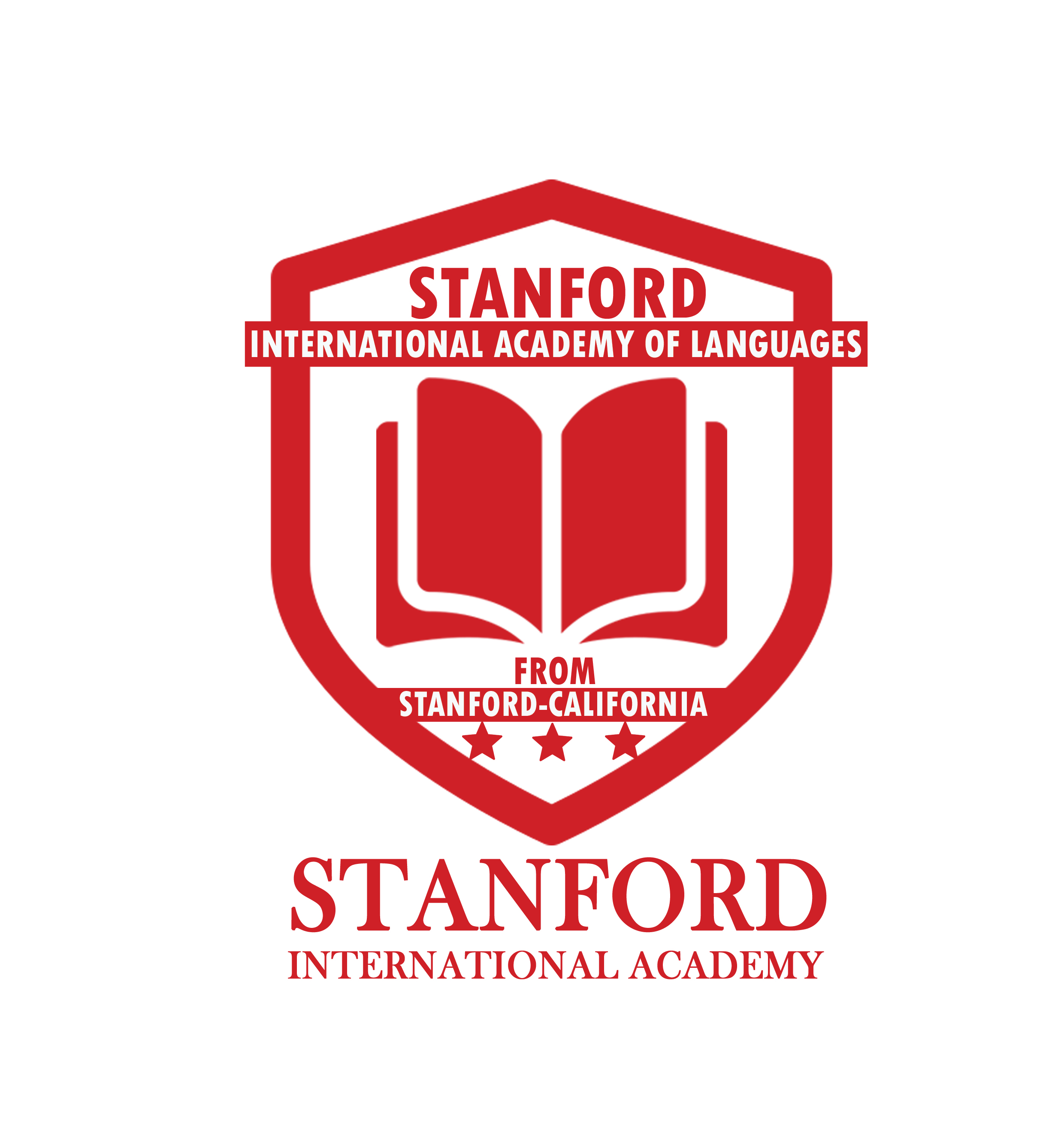 شعار أكاديمية ستانفورد لتعليم اللغات